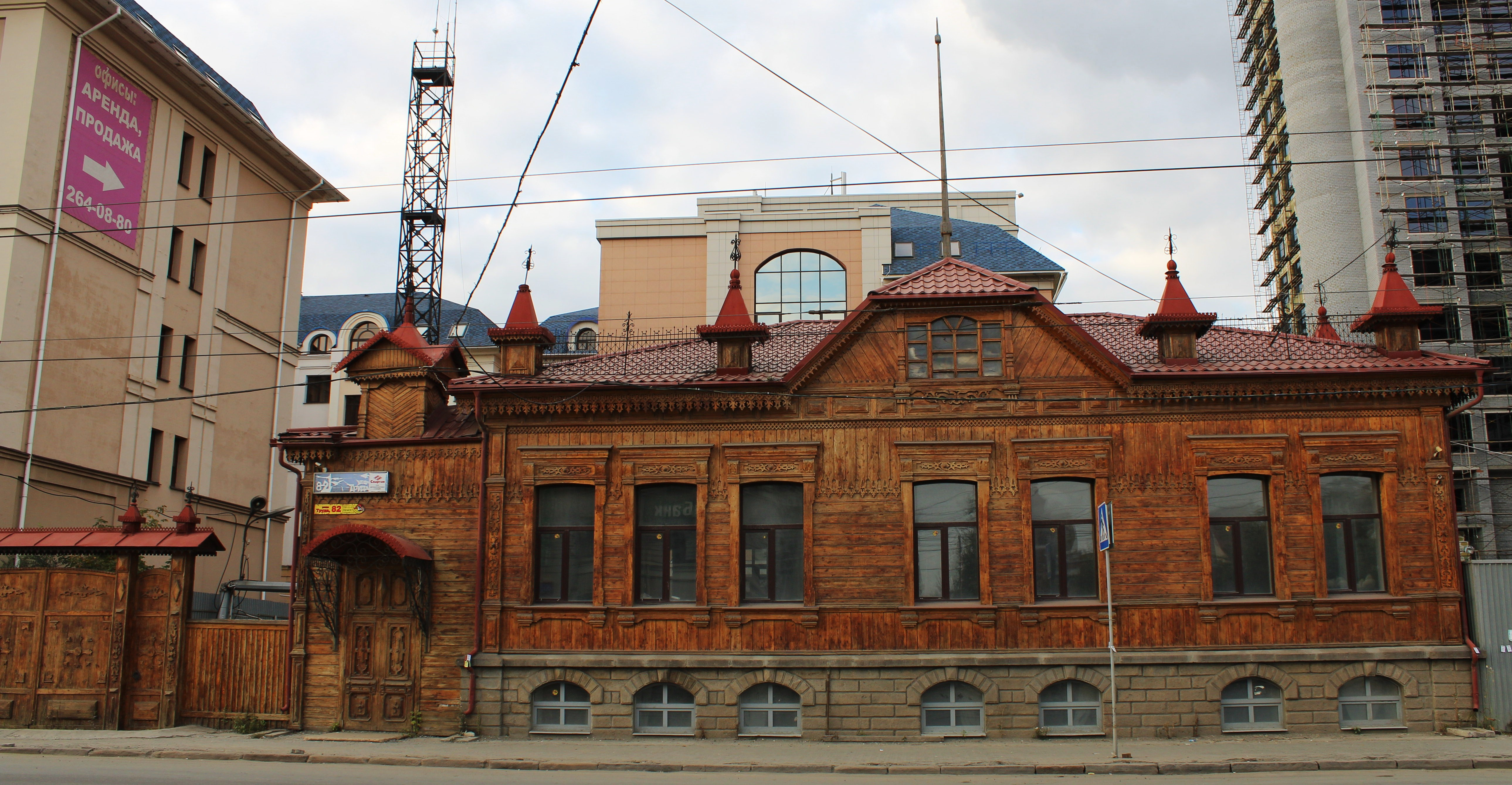 Особняк Архипова (Челябинская область, Челябинск, труда улица, 82)